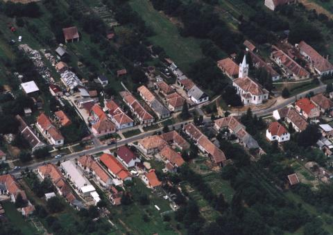 Tömörd, Hungary, aerialphotgraphy